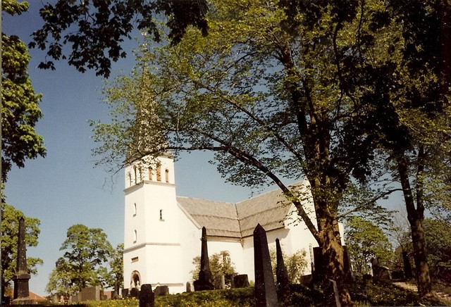 Furnes kirke